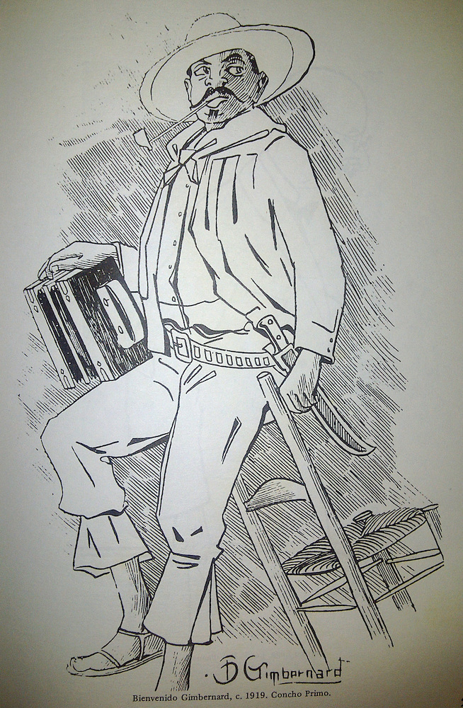 ilustracion de conchoprimo, 1919 de Bienvenido Gimbernard.